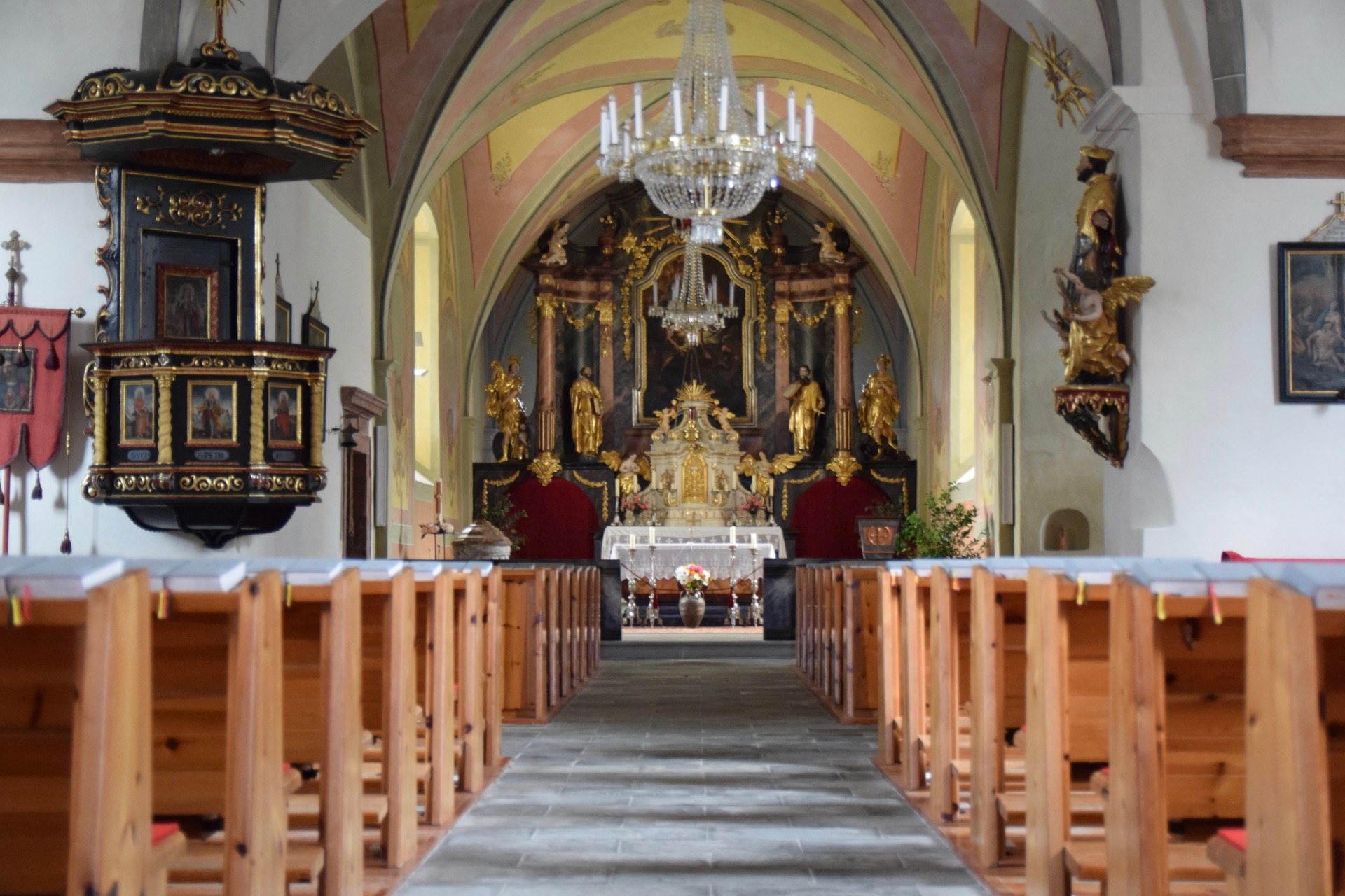 Kath. Pfarrkirche hl. Laurentius und Friedhof